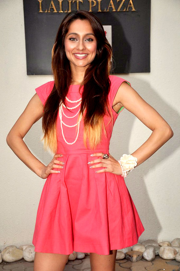 Anousha Dandekar unveils MTV The ONE